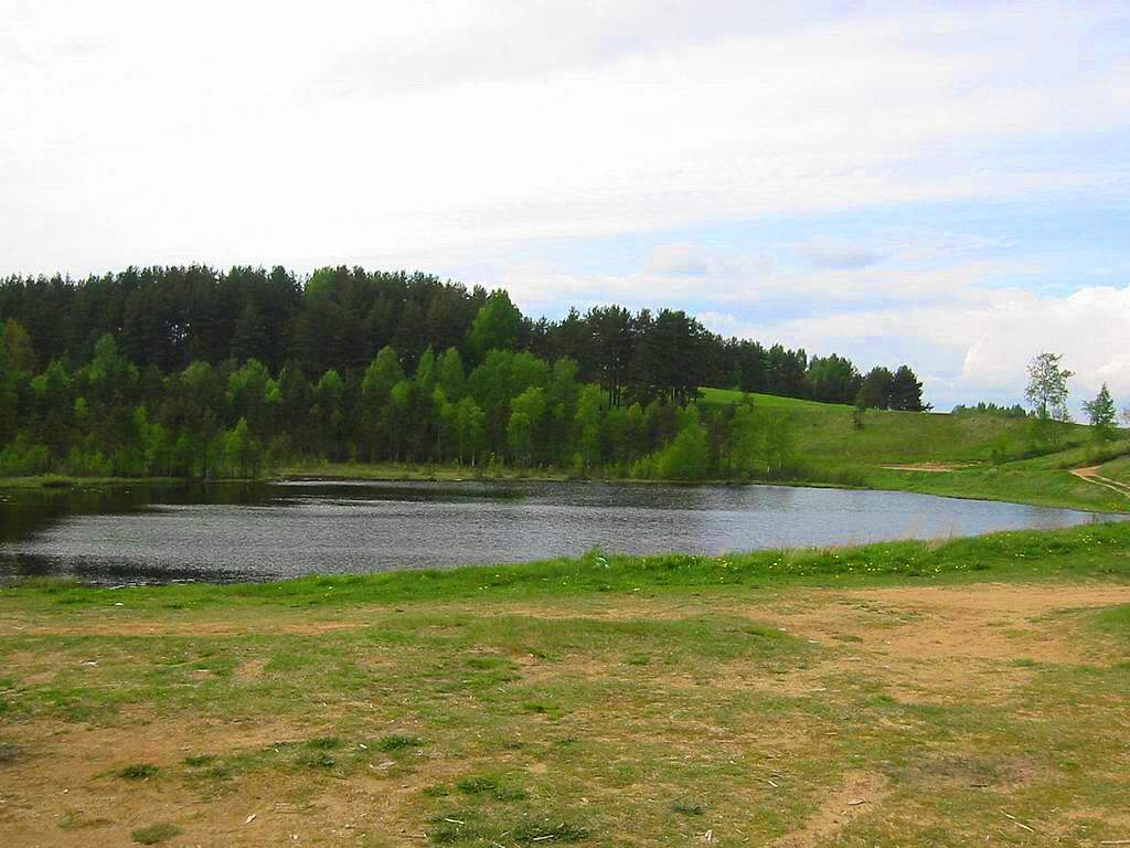 Реликтовое, бессточное озеро на Колтушской холмисто-камовой возвышенности.